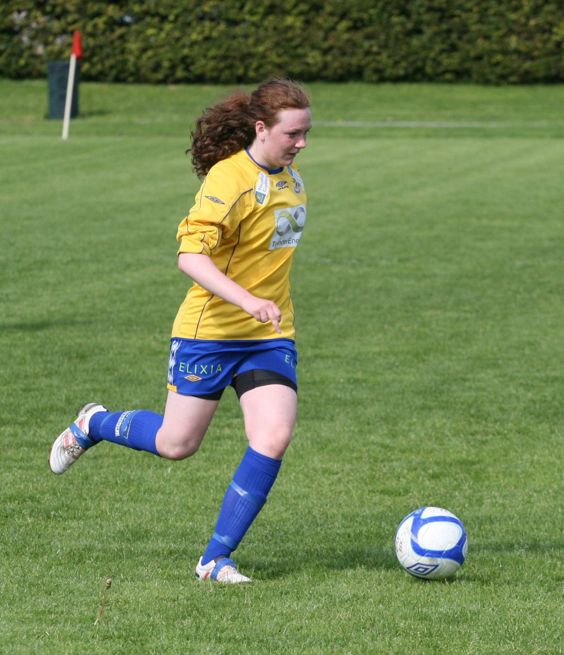 Fotballspilleren Marte Slettestøl